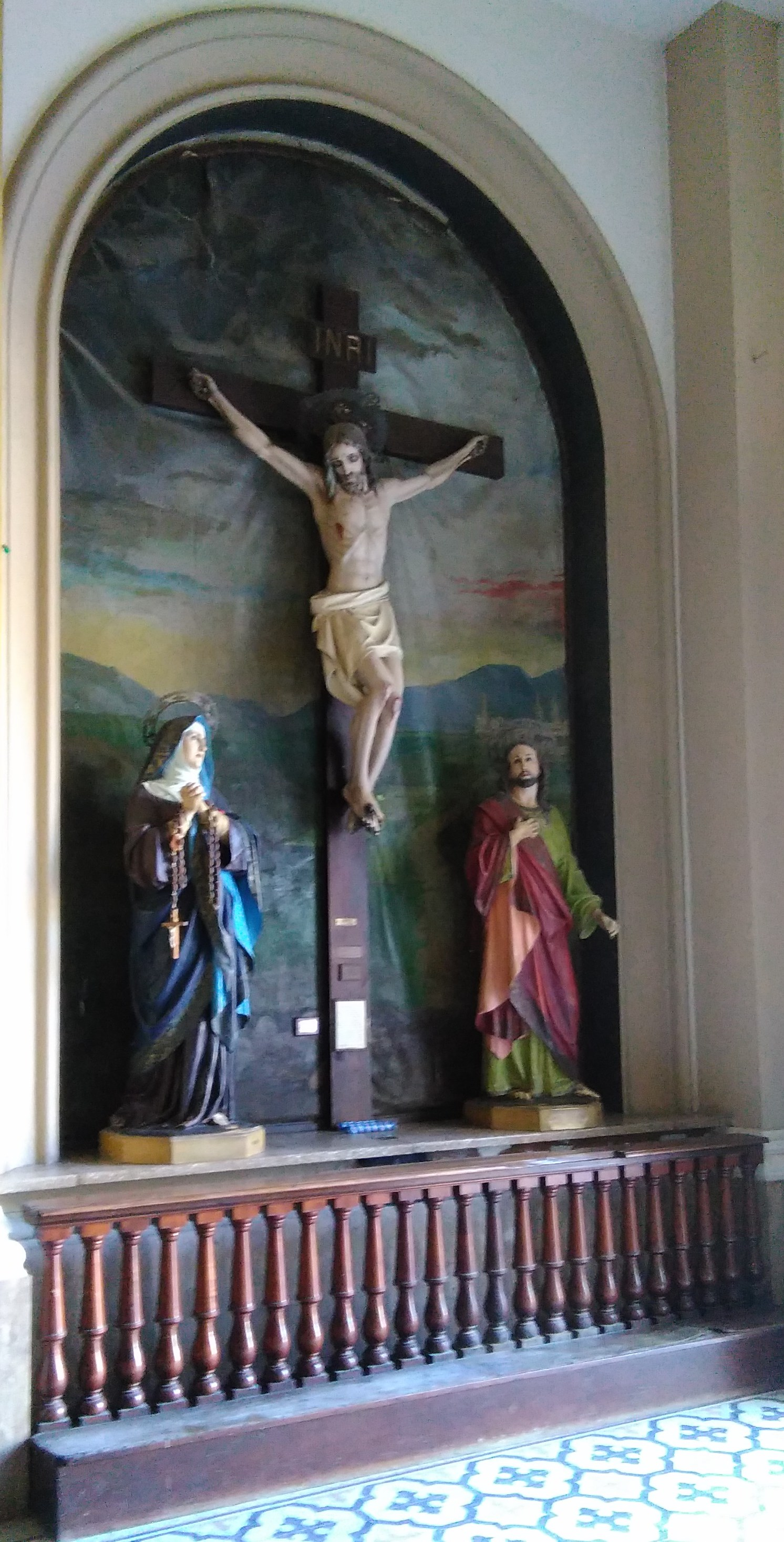 Reclinatorio Lateral Parroquia Inmaculado Corazon de Maria Bahia Blanca.jpg